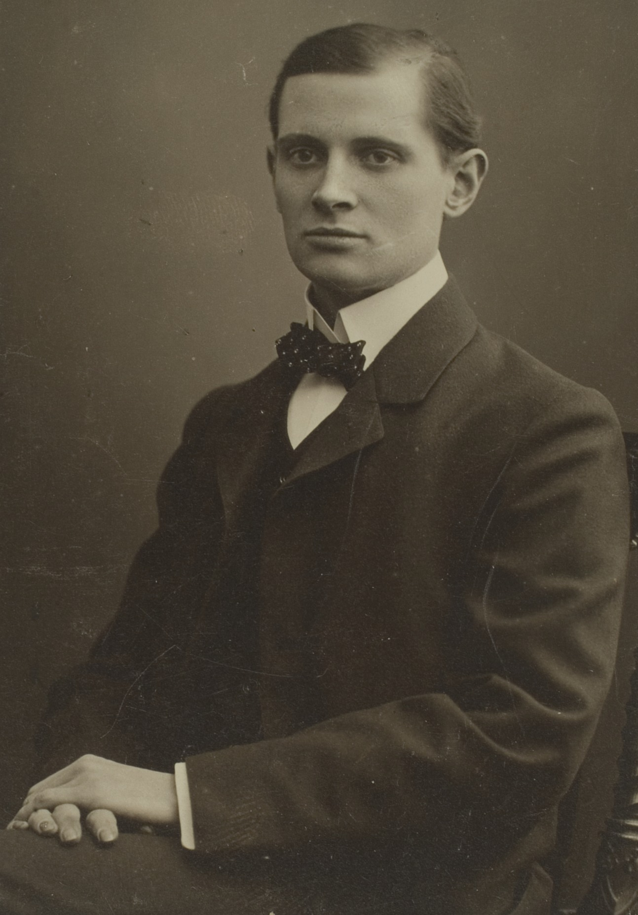 Hartwig Heinrich Franzen, Chemiker, 1910–1912 Professor in Heidelberg